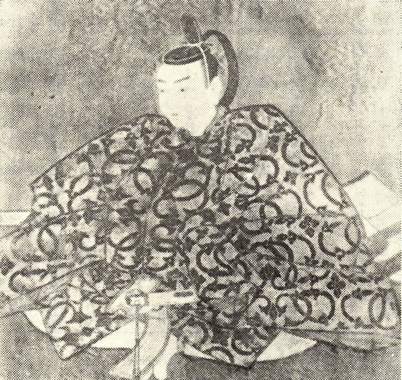 永井尚備の肖像。